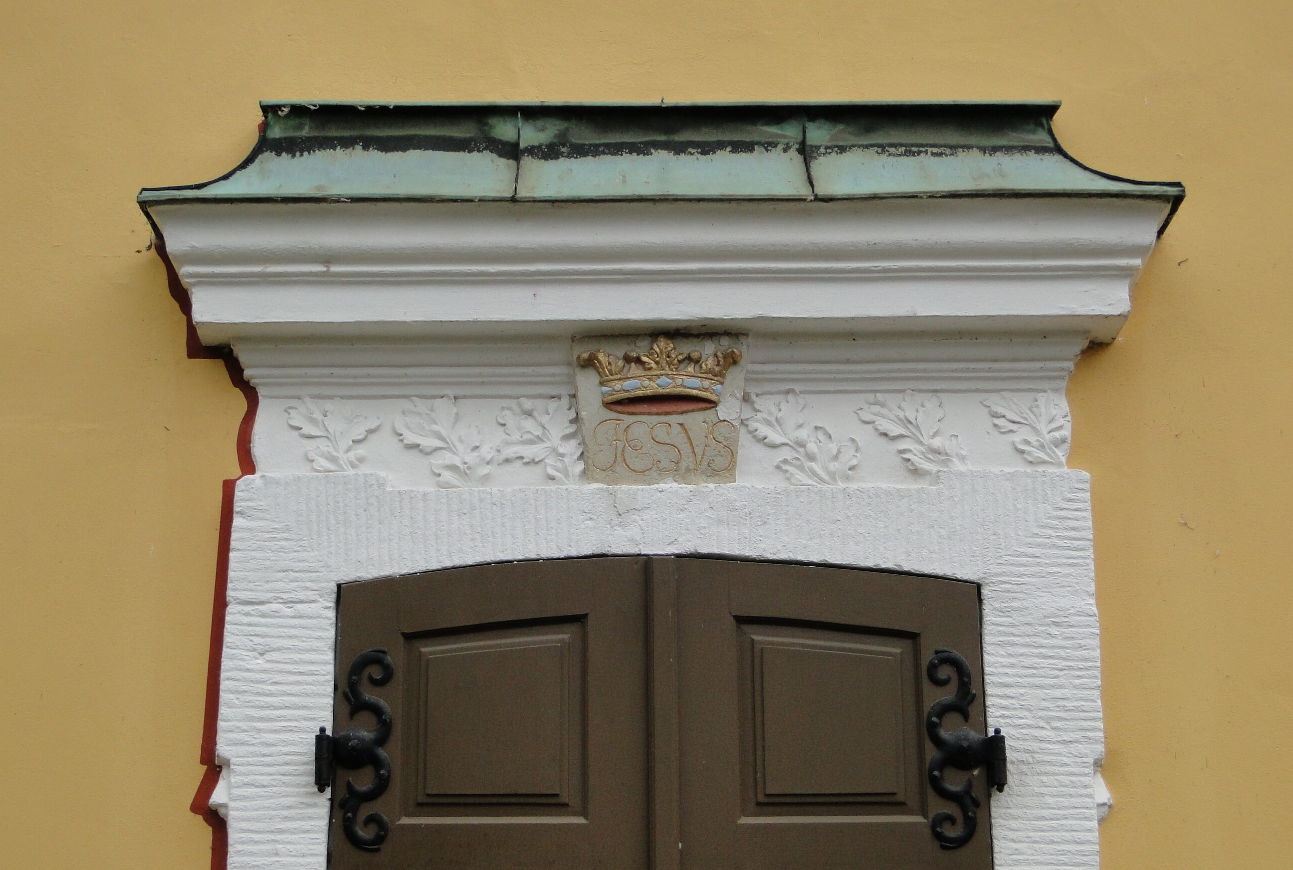 Portal der Schifferkirche Maria am Wasser in Hosterwitz